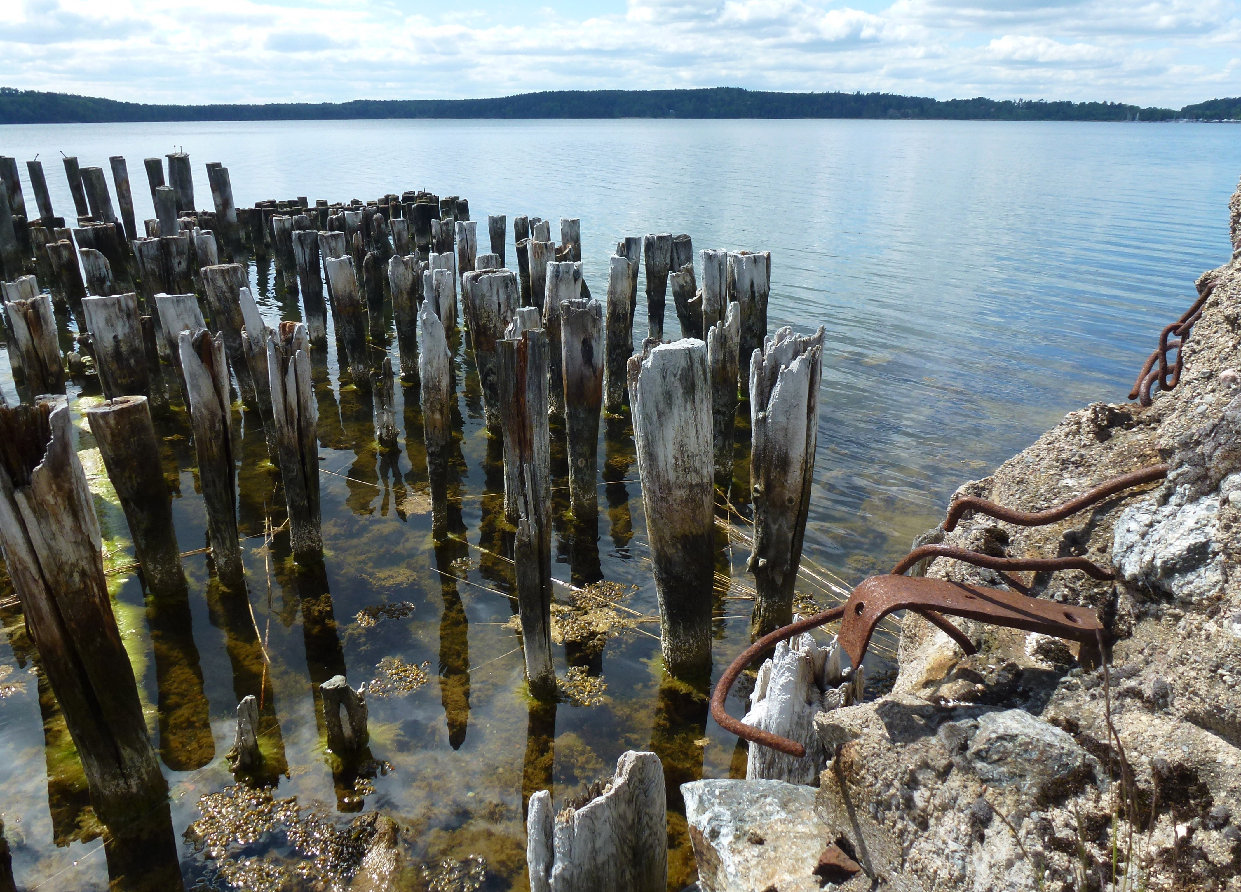 Sjöbergs varv, piren med rester av stapelbädden